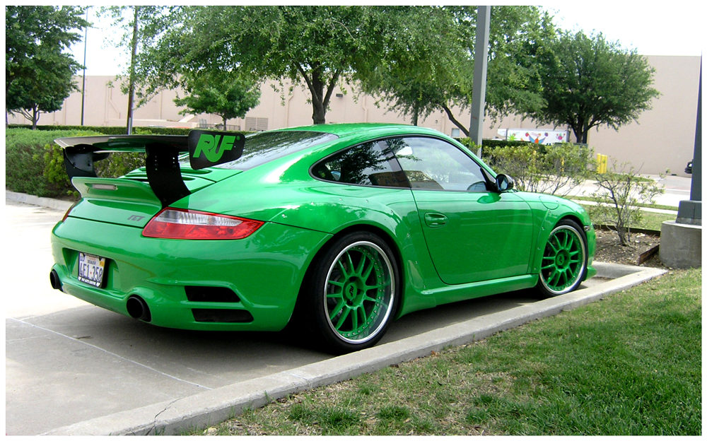 Ruf RGT 2007.jpg